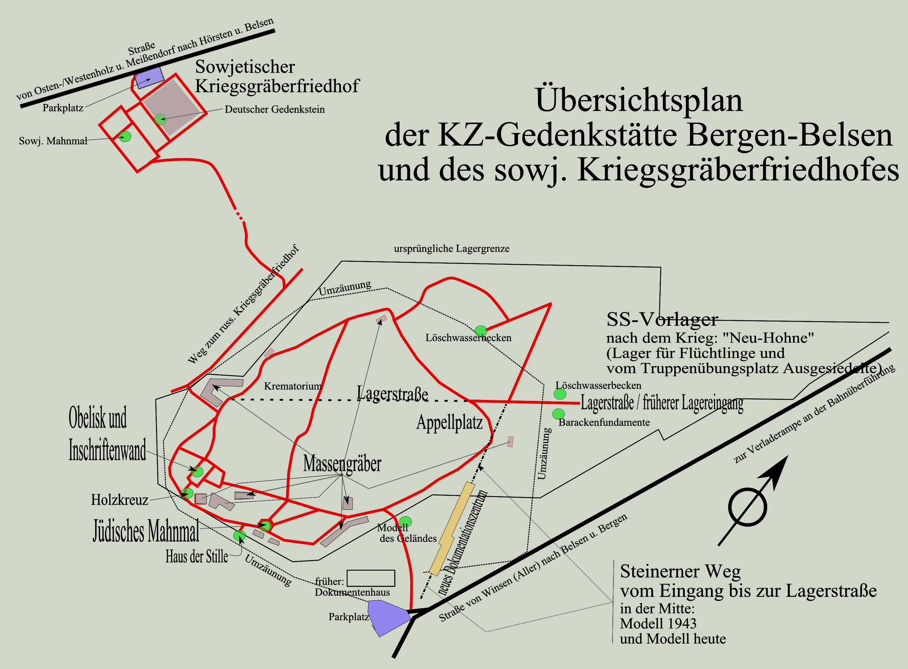 Übersichtsplan für das ehemalige KZ Bergen-Belsen und den russischen Kriegsgräberfriedhof